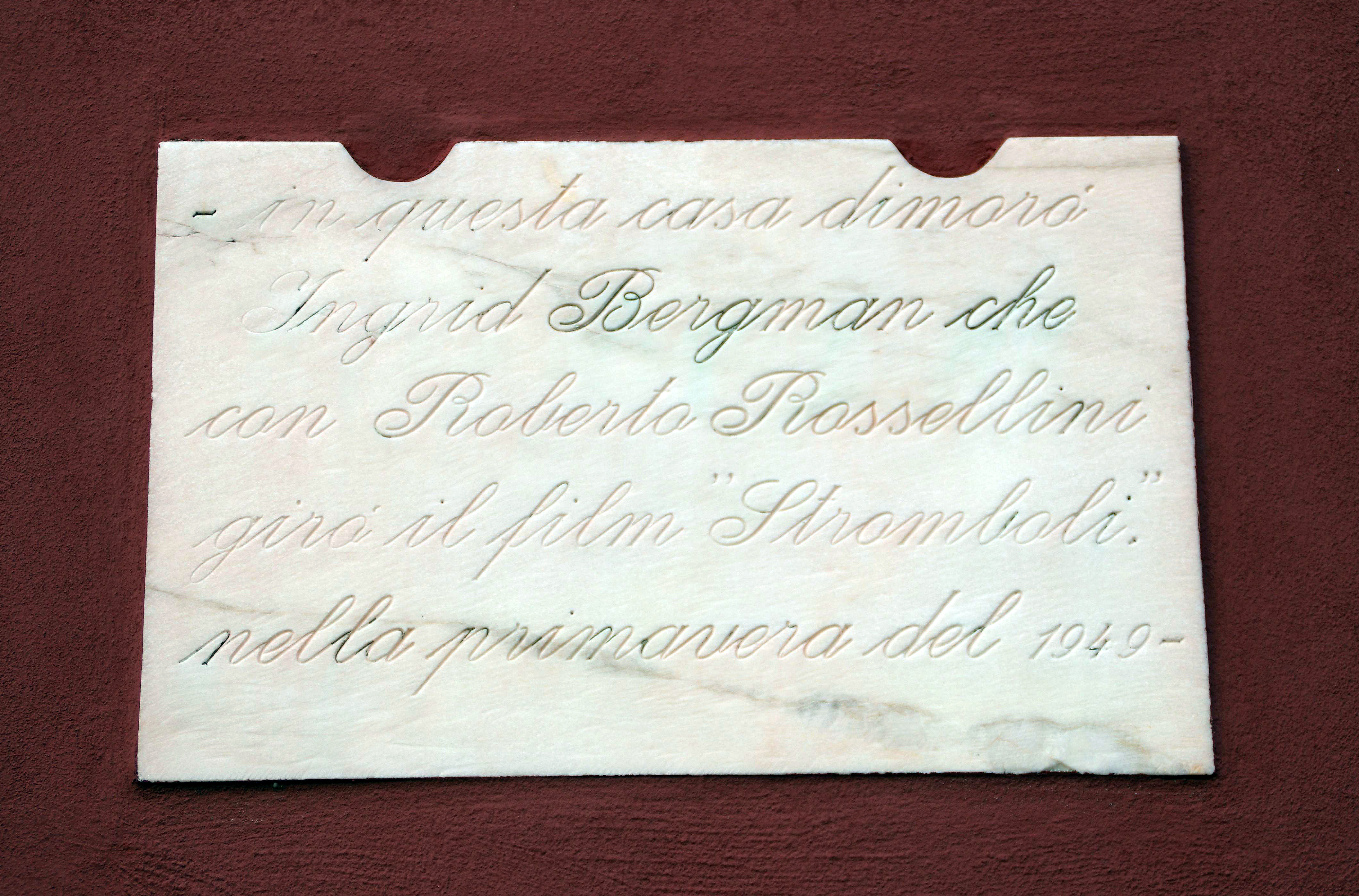 Stromboli in der Region Sizilien in Italien. Das Schild an dem Haus erinnert an den Aufenthalt von Ingrid Bergmann und Roberto Rossellini im Jahre 1946, als der Film Stromboli produziert wurde.